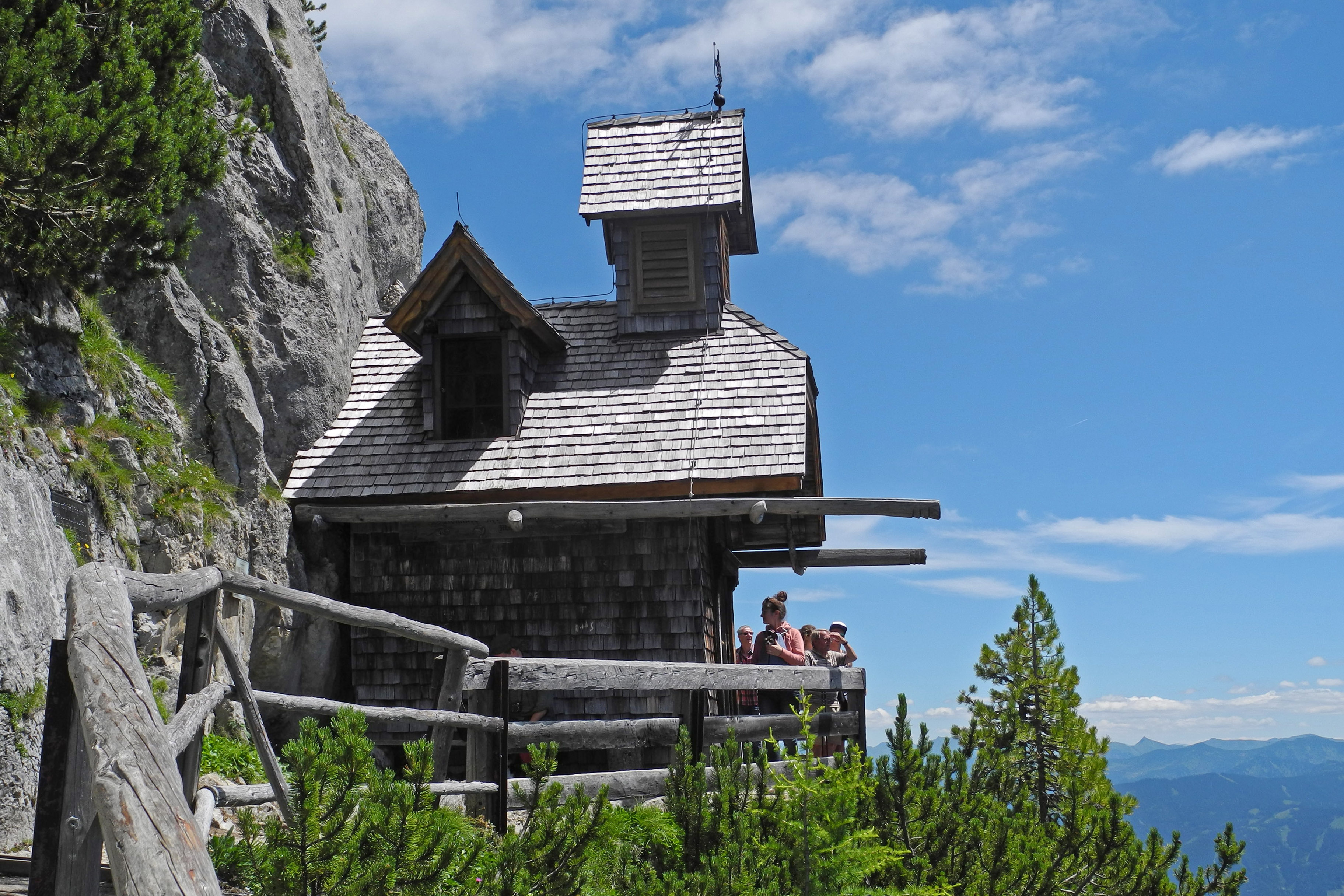 Das Stoderkircherl (1898 m) am Hang des Stoderzinken bei Gröbming